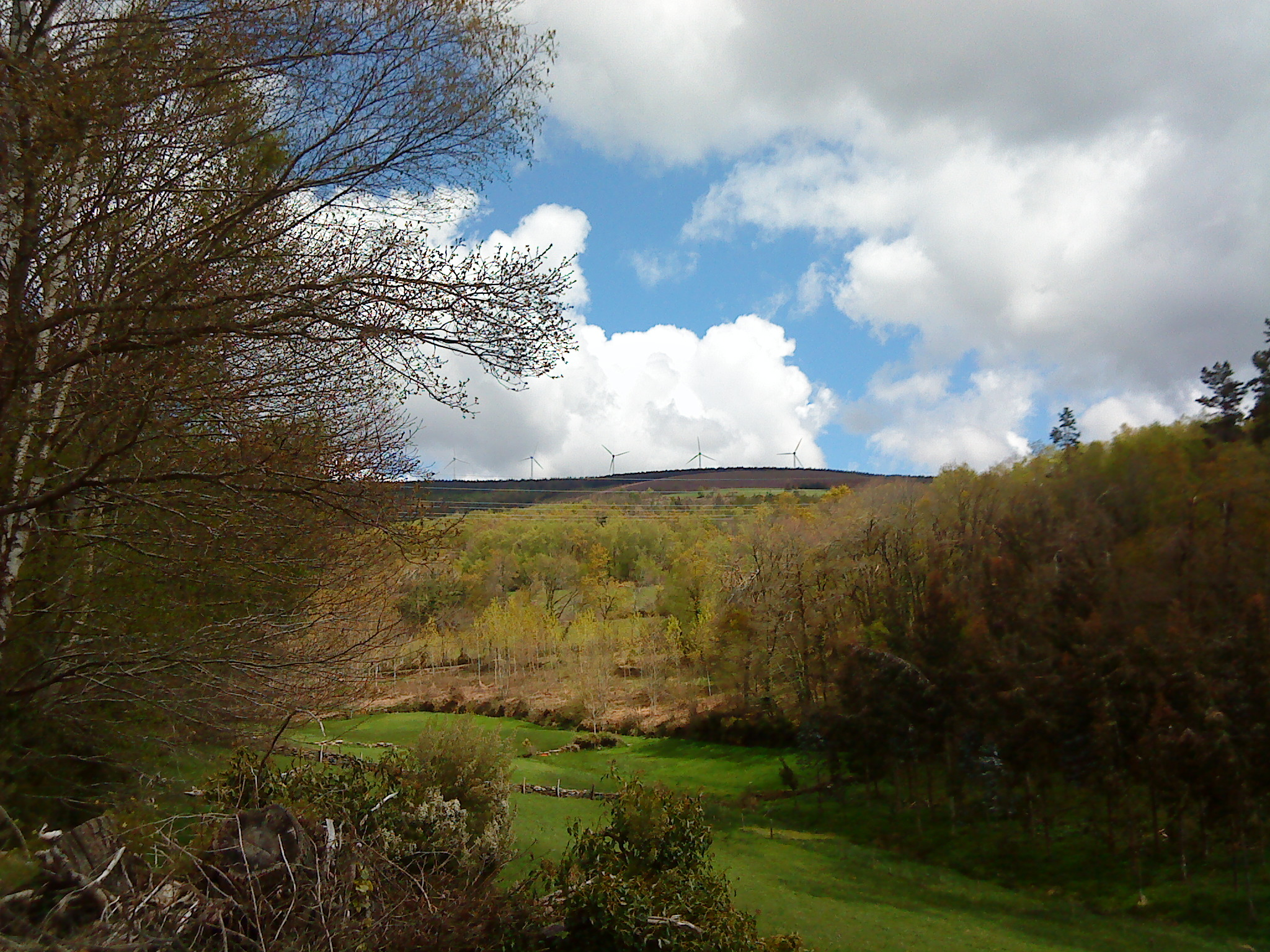 Paisaje en la Parroquia de Vilabade, Rodinso.